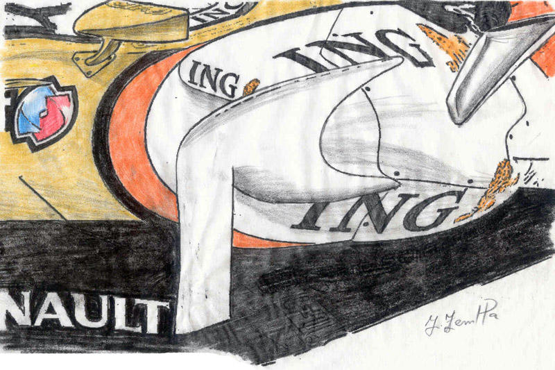 barge board detail